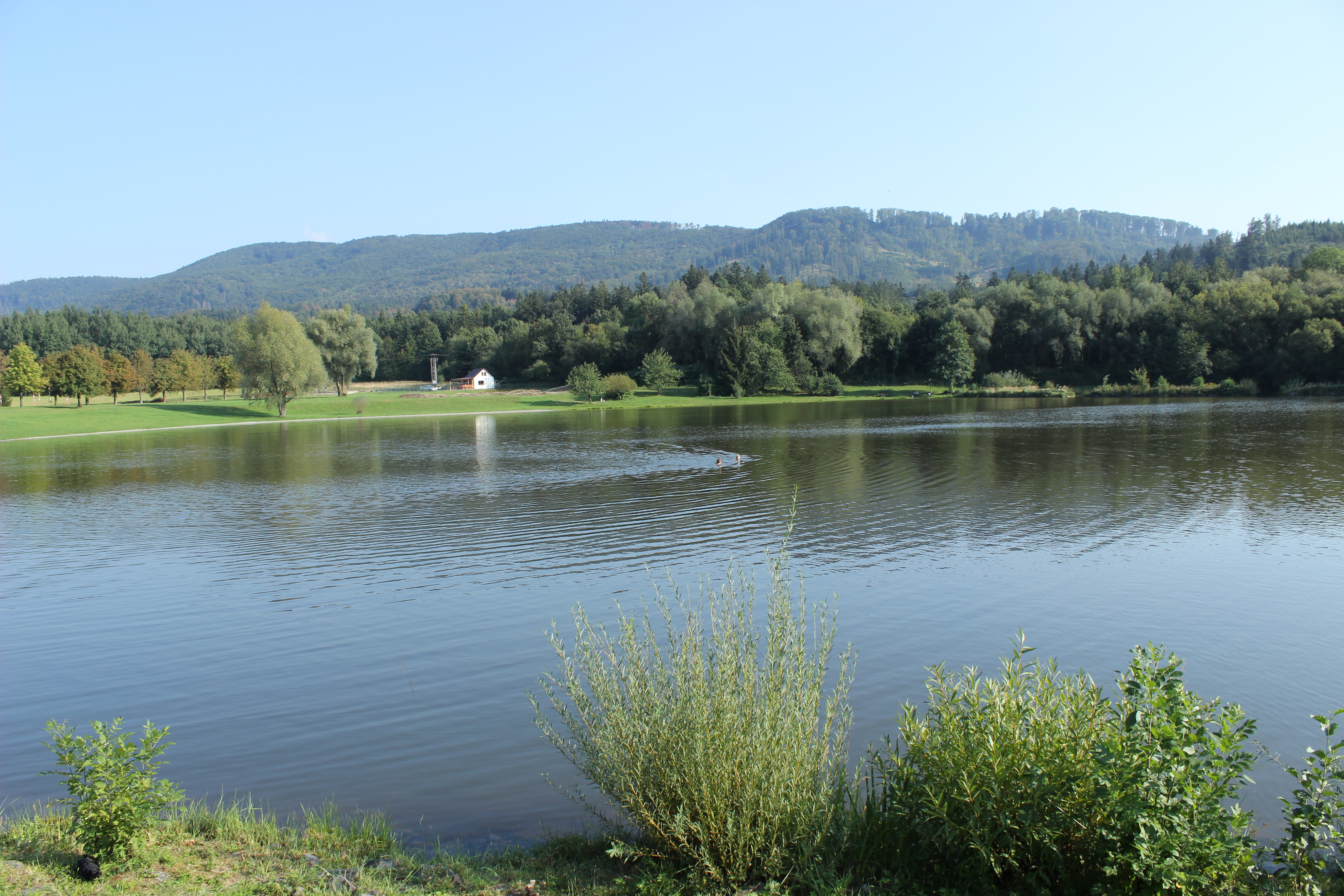 Vodní nádrž Kacabaja u Hodslavic. This image was acquired during the event Wikiměsto Kopřivnice.